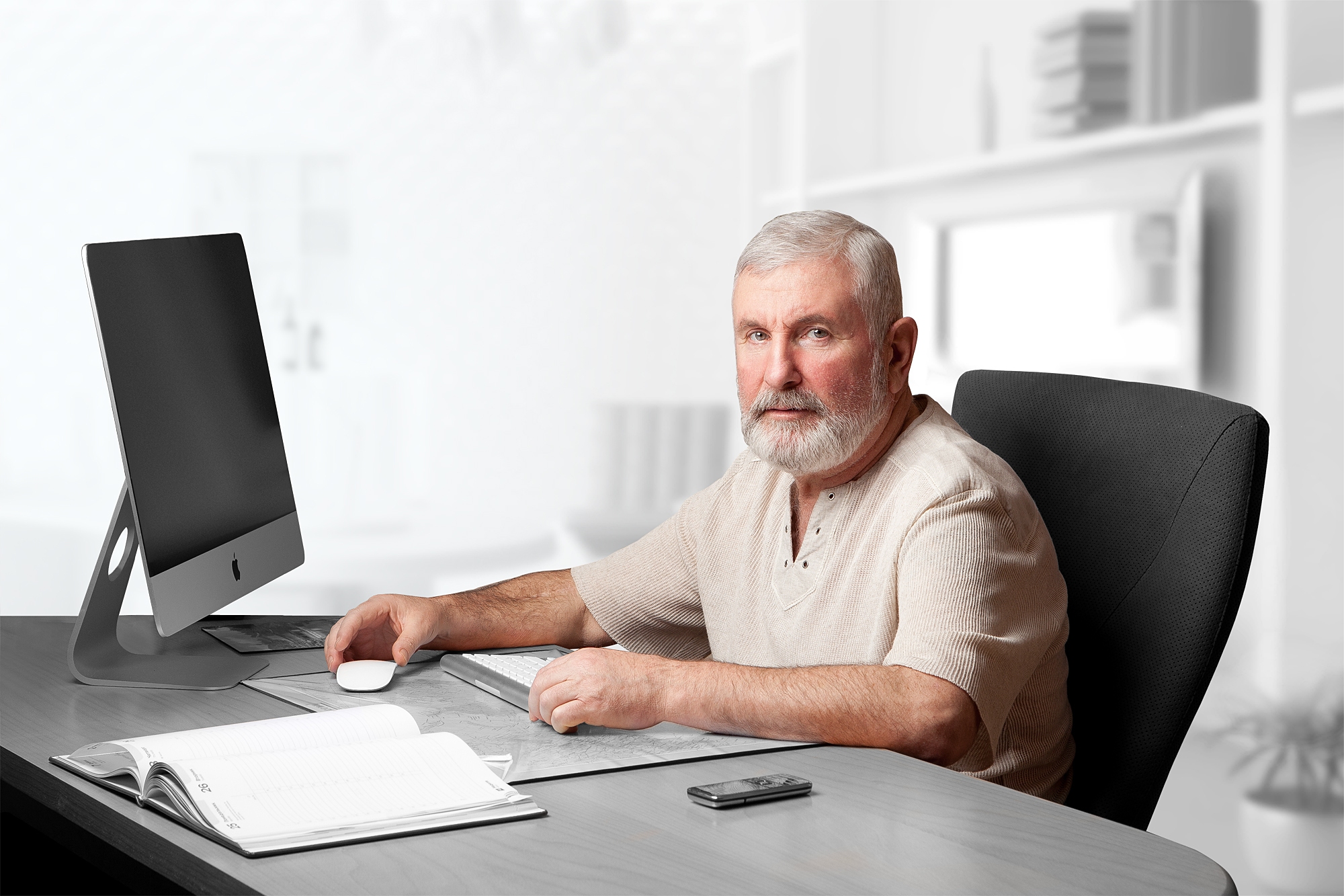 Абрамов В.А.